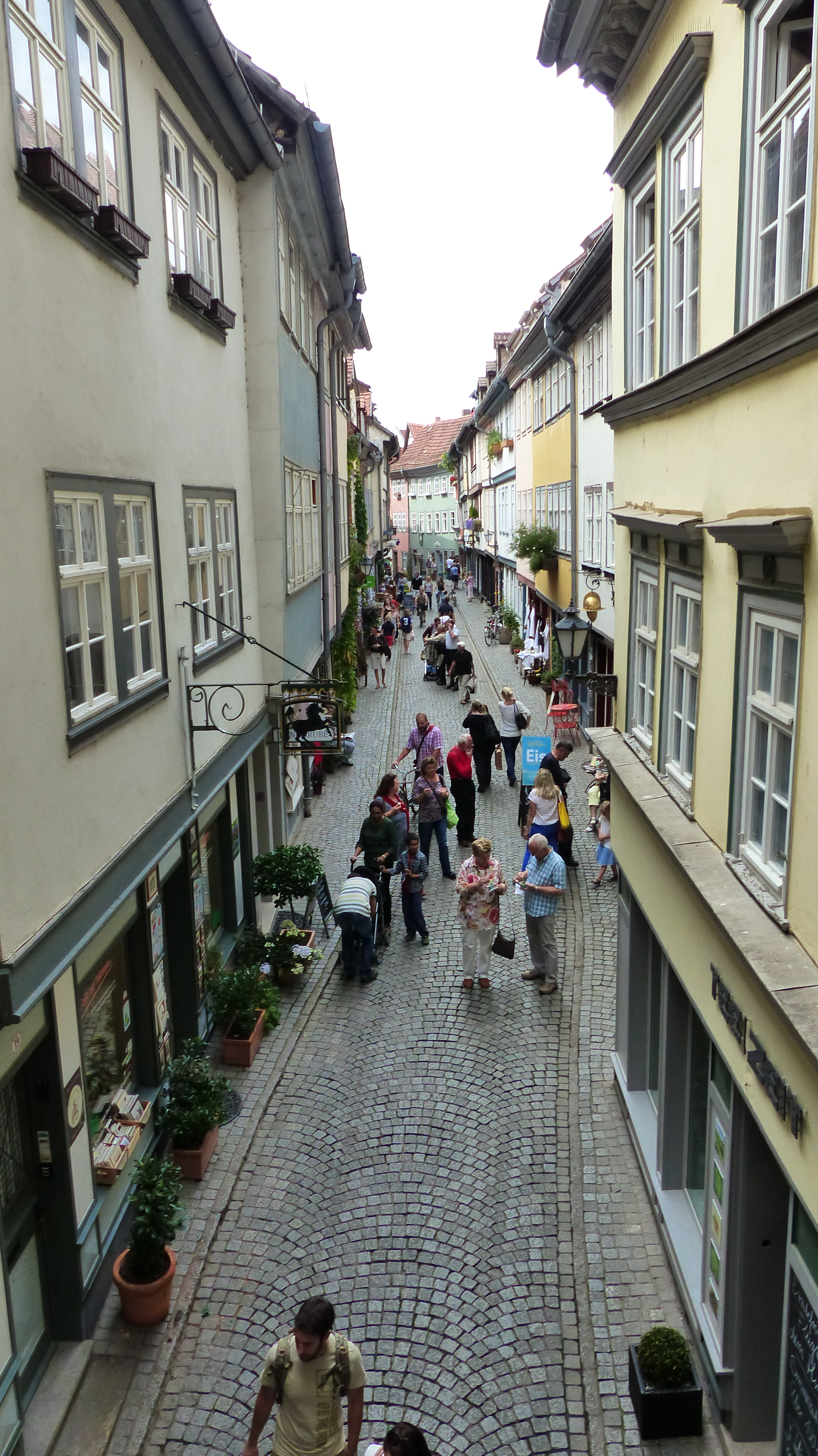 WLM-Fototour Erfurt 2014 Dieses Foto wurde im Rahmen der WLM-Fototour 2014 in Erfurt erstellt, die vom 29. bis 31. August 2014 zum Auftakt des Wettbewerbs Wiki Loves Monuments 2014 statt fand. The making of this document was supported by the Community-Budget of Wikimedia Germany. Krämerbrücke in Erfurt